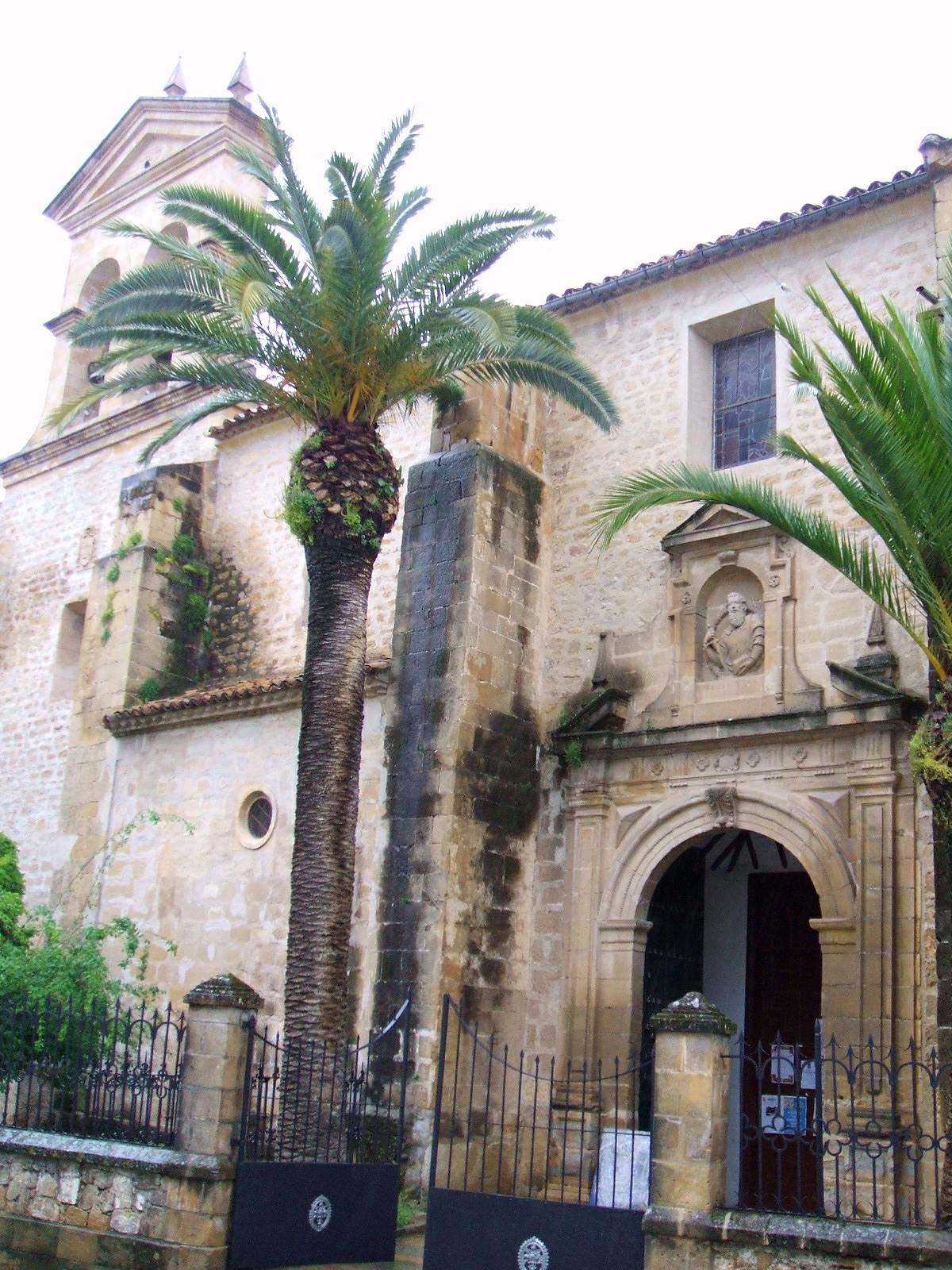 Church of San Pablo, Baeza, Spain